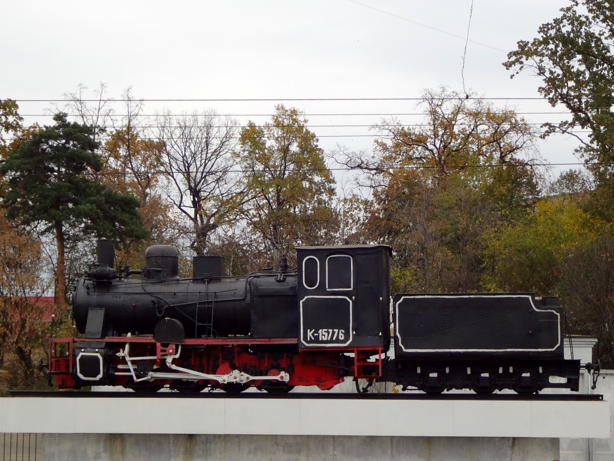 Паровоз на станции Боярка.